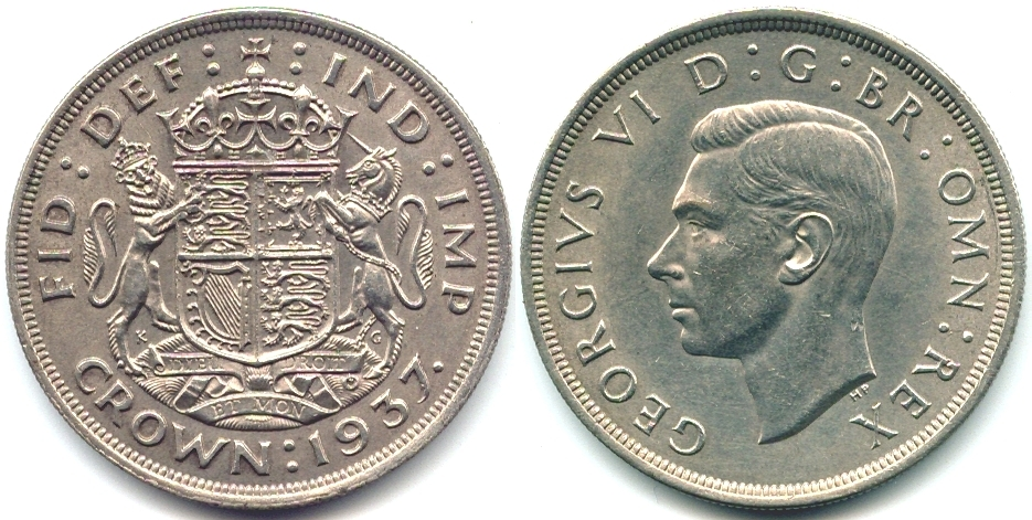 Коронационная крона Георга VI Великобритания (1937)